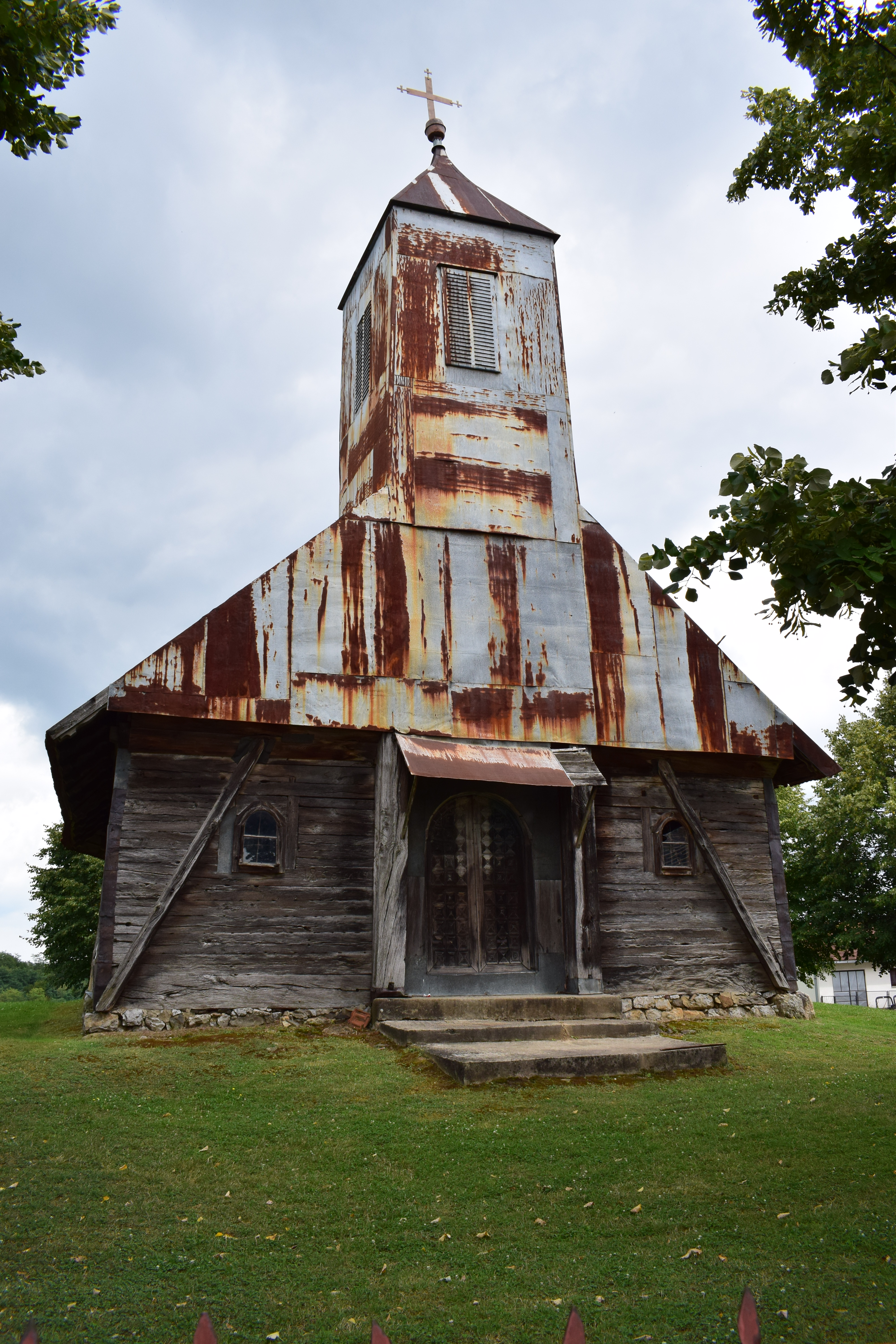 Црква Вазнесења Господа Исуса Христа у Ракелићима изграђена је на мјесту које се некад звало Збориште. Прије ње на овом мјесту била је мања црква-чарда са околним гробљем, срушена у првој половини 19. вијека. Црква је, након дуго година градње изграђена и освештана 1856. године, а посвећена је Светом Вазнесењу Господњем. Саградили су је мајстори из Приједора, о чему говори урезана година 1856. и инцијали М.Ч. на средњим брвнима. Данашња црква брвнара, за разлику од првобитне из средине 19. вијека, има темељни зид висок око пола метра. Постоје два улаза у цркву, један на јужној, а други, главни, на западној страни. Иконостас је из времена подизања цркве са иконома које су радили мастори из Костајнице. У цркви се налази неколико црквених реликвија из Јерусалима међу којима се истиче Јерусалимска икона. Поред старе цркве брвнаре у Ракелићима је 1986. године подигнута нова црква посвећена Светој Тројици.